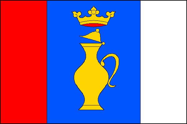 Vlajka obce Černíkov